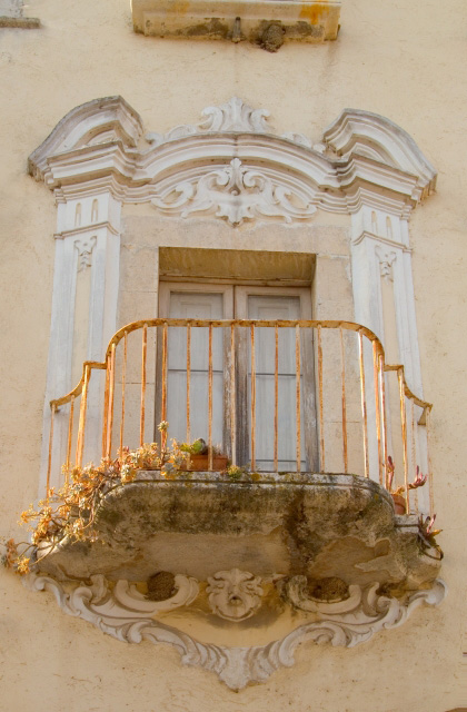 Balcone barocco di un palazzo presso Piazza Antinora, San Lorenzo Maggiore (BN)